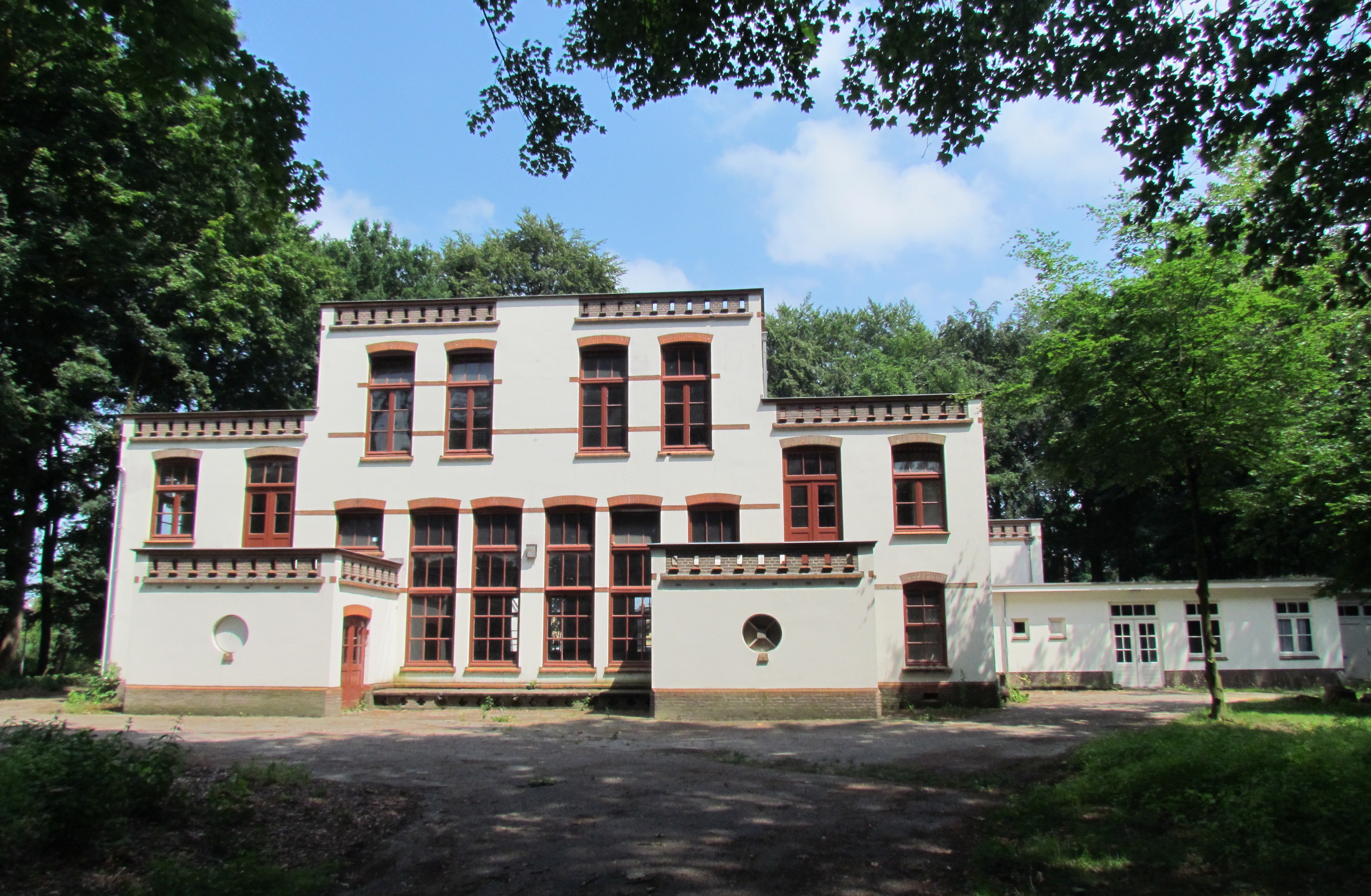 Het Apeldoornsche Bosch, 'gebouw A' ofwel de Linnenkamer